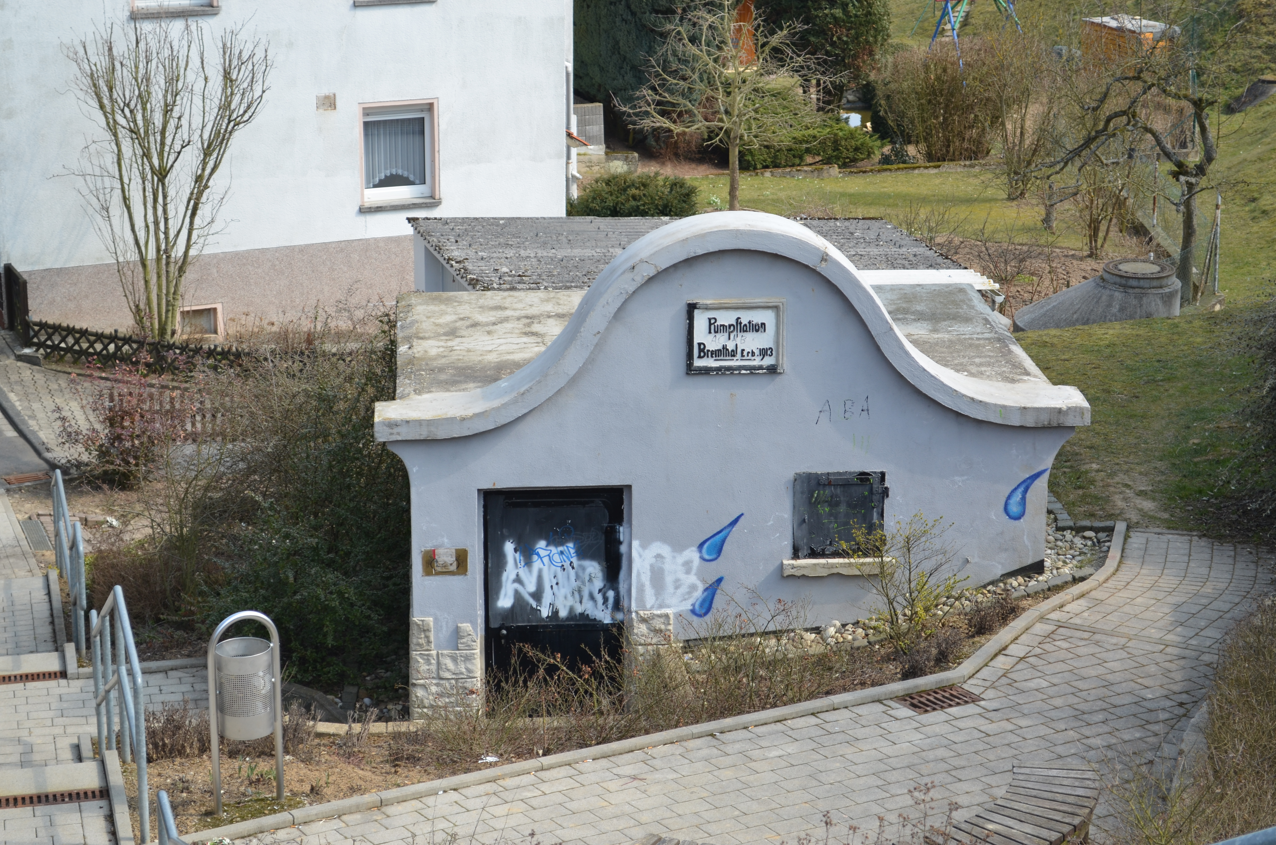 Bremthal, Pumpstation Bornstraße Schäfergasse